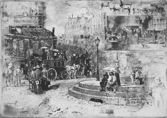 "La place Pigalle en 1878" par Félix Buhot (1847-1898).